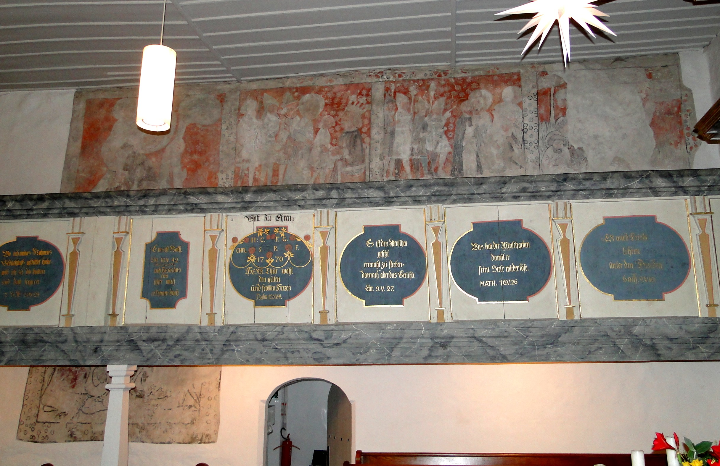 Christophoruskirche Dresden-Wilschdorf